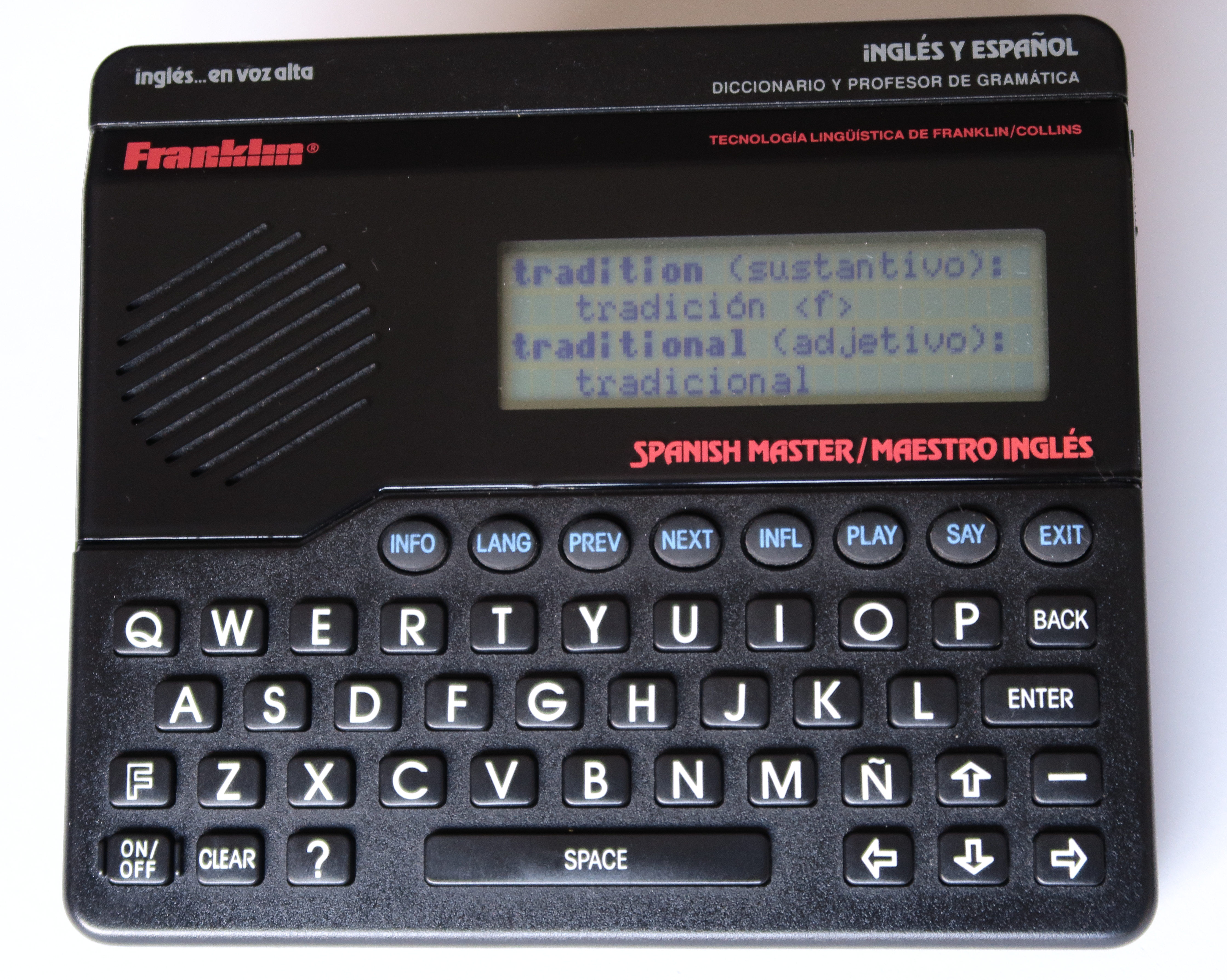 Traductor Franklin, Maestro inglés modelo SM-600 (1987-1991)